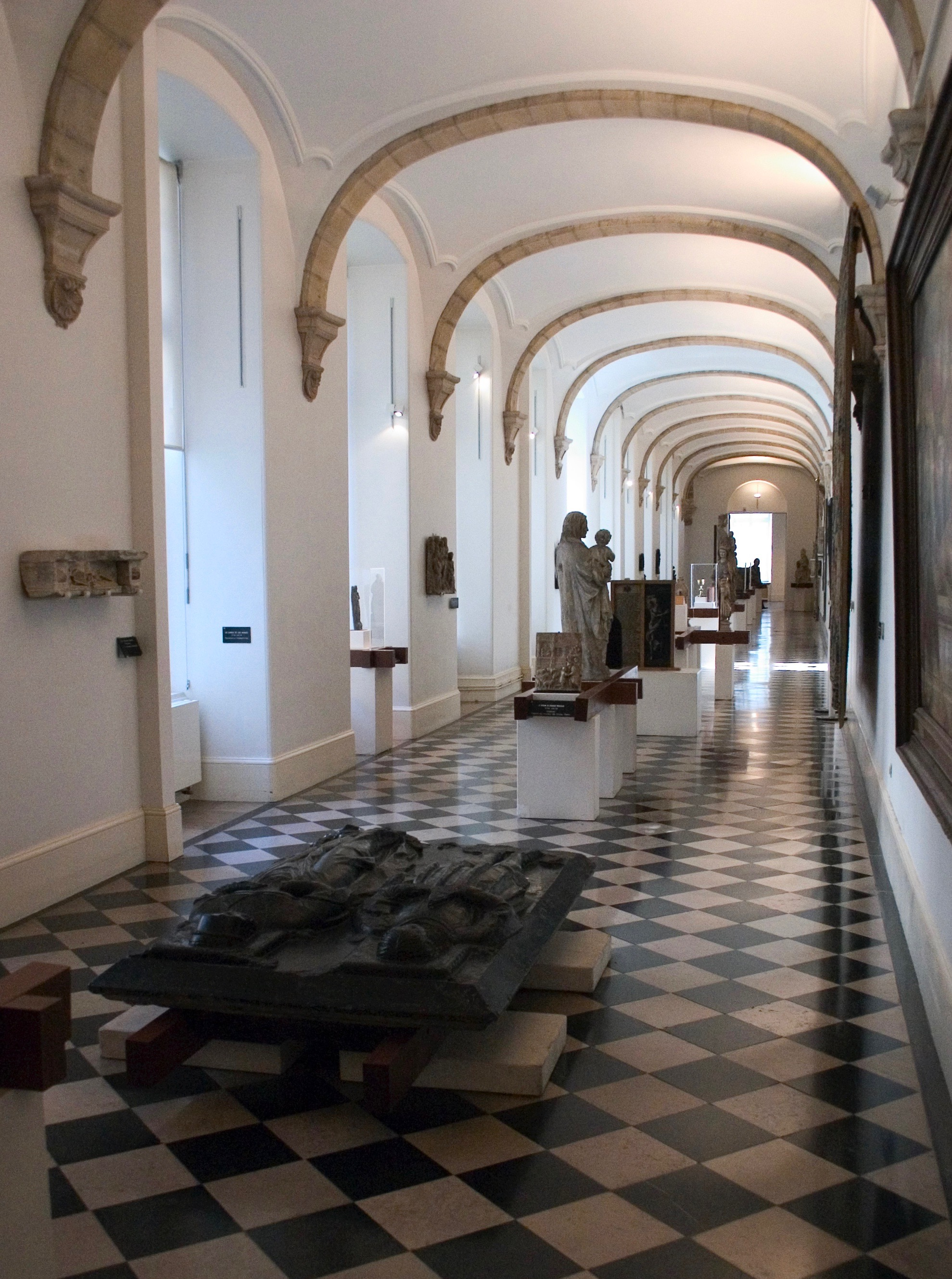 Musée d'Arras